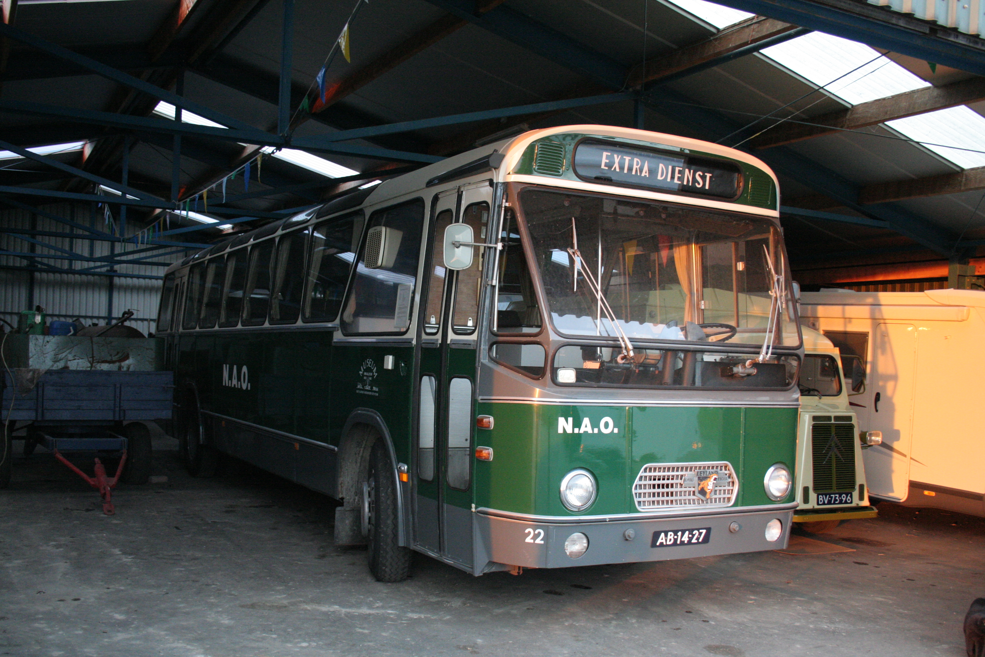 De NAO 22 uit 1966 in een loods in Nieuwkoop.